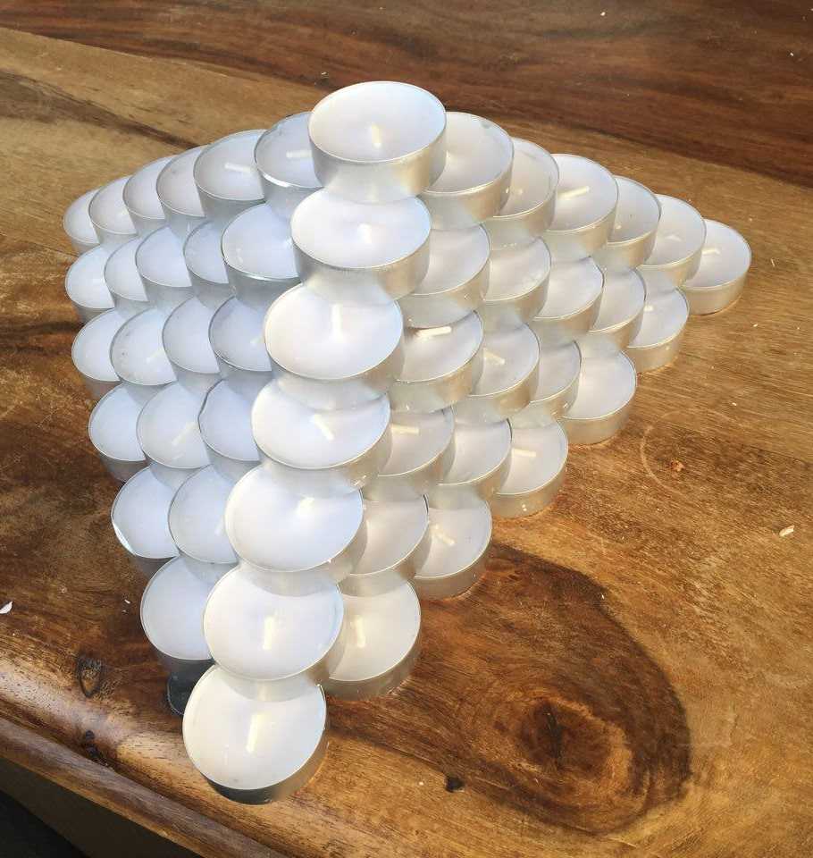 Telys stablet i pyramideform